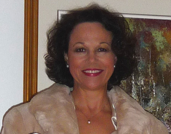 Gertrude Bourdon au Bal des grands romantique en mars 2010